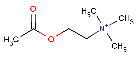 Structure de l'acétylcholine